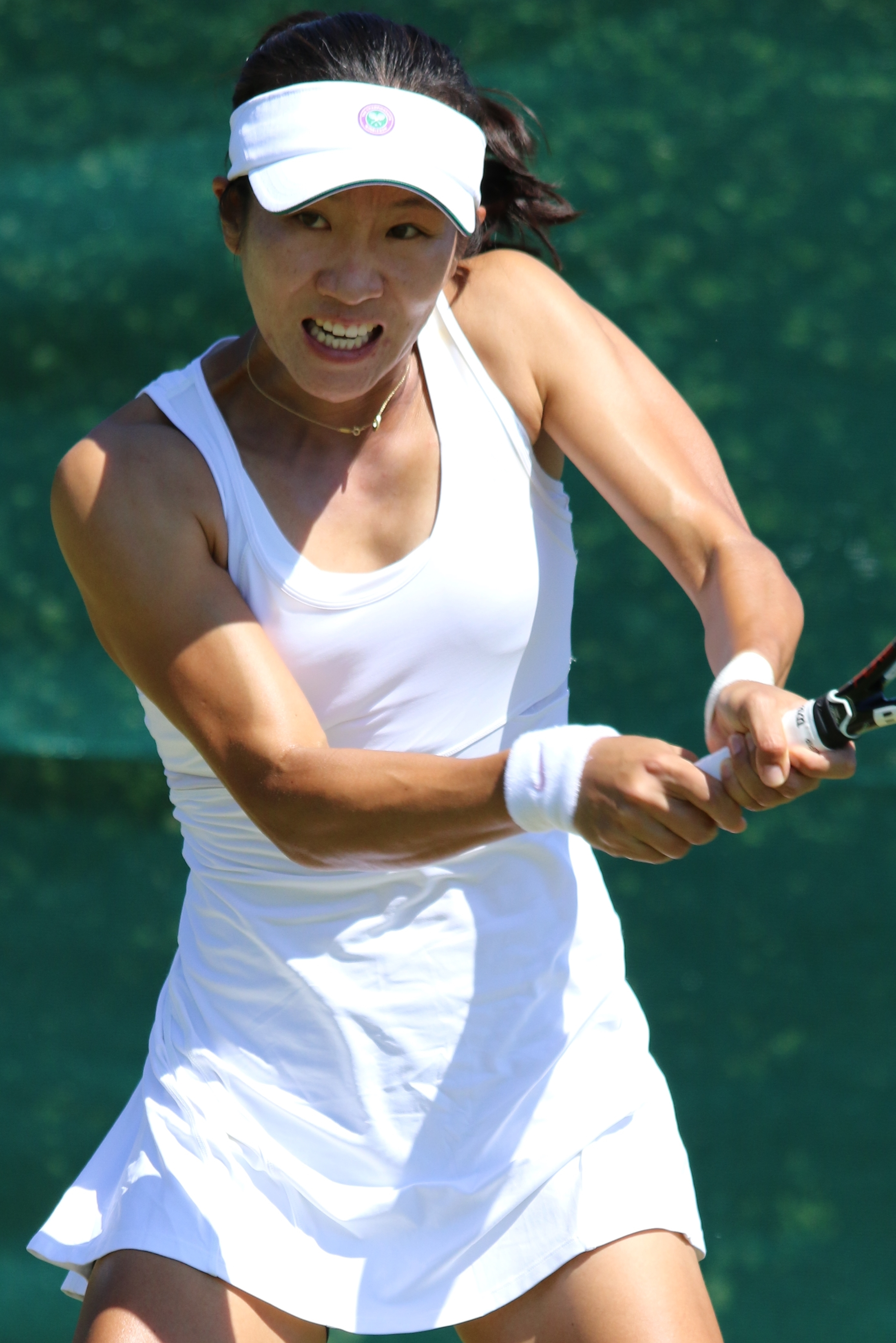 Lu, Jing-Jing WMQ18 (21)